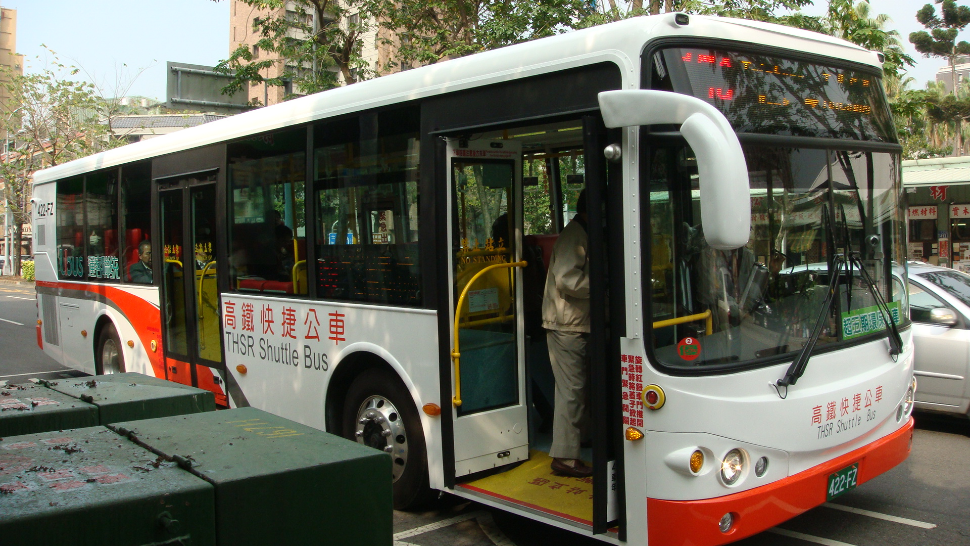 台中市公車159路(低地板高鐵快捷)